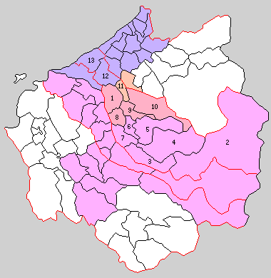 滋賀県愛知郡の町村制時点の町村。